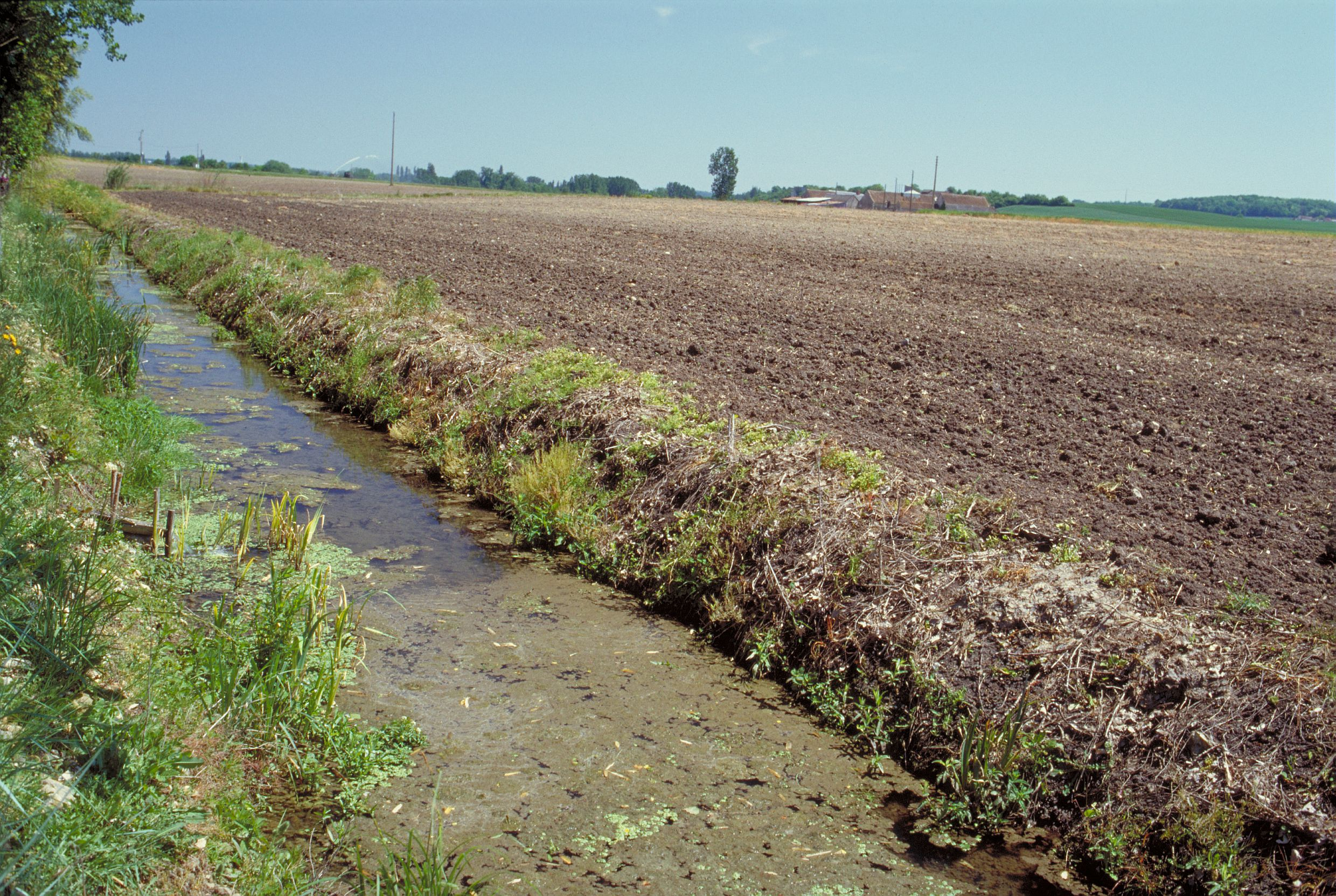 Développement de la microflore aquatique en bordure d'un champ cultivé